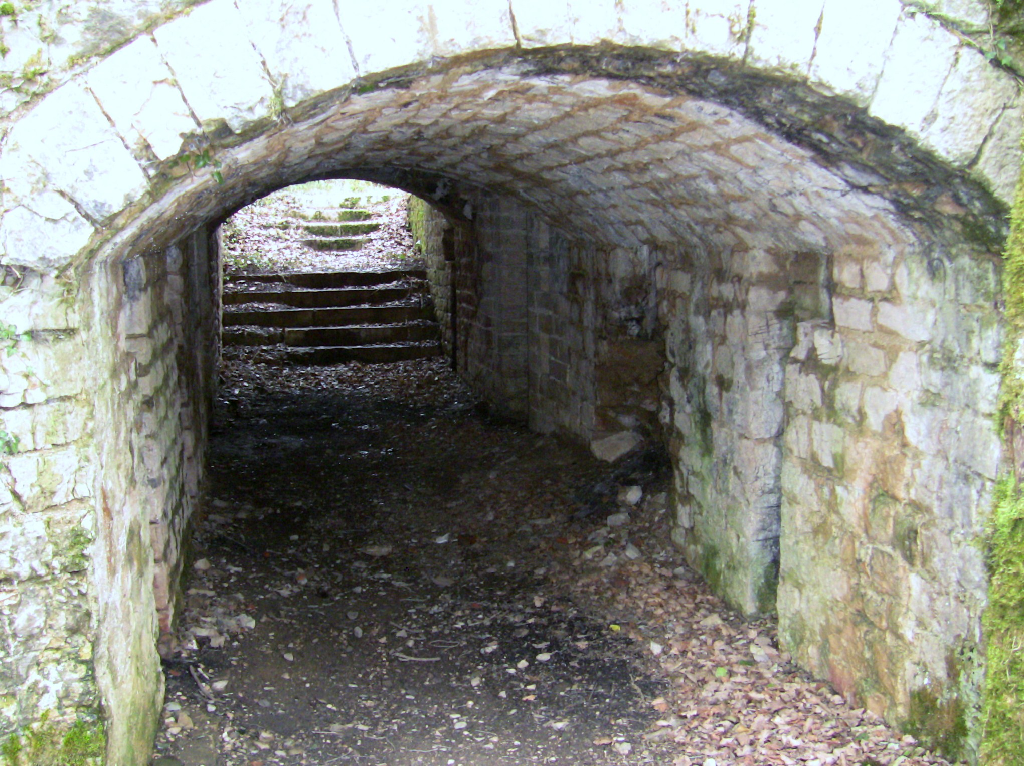 La traverse de la batterie extrême sud-ouest du fort de Planoise, à Besançon (Doubs, France).